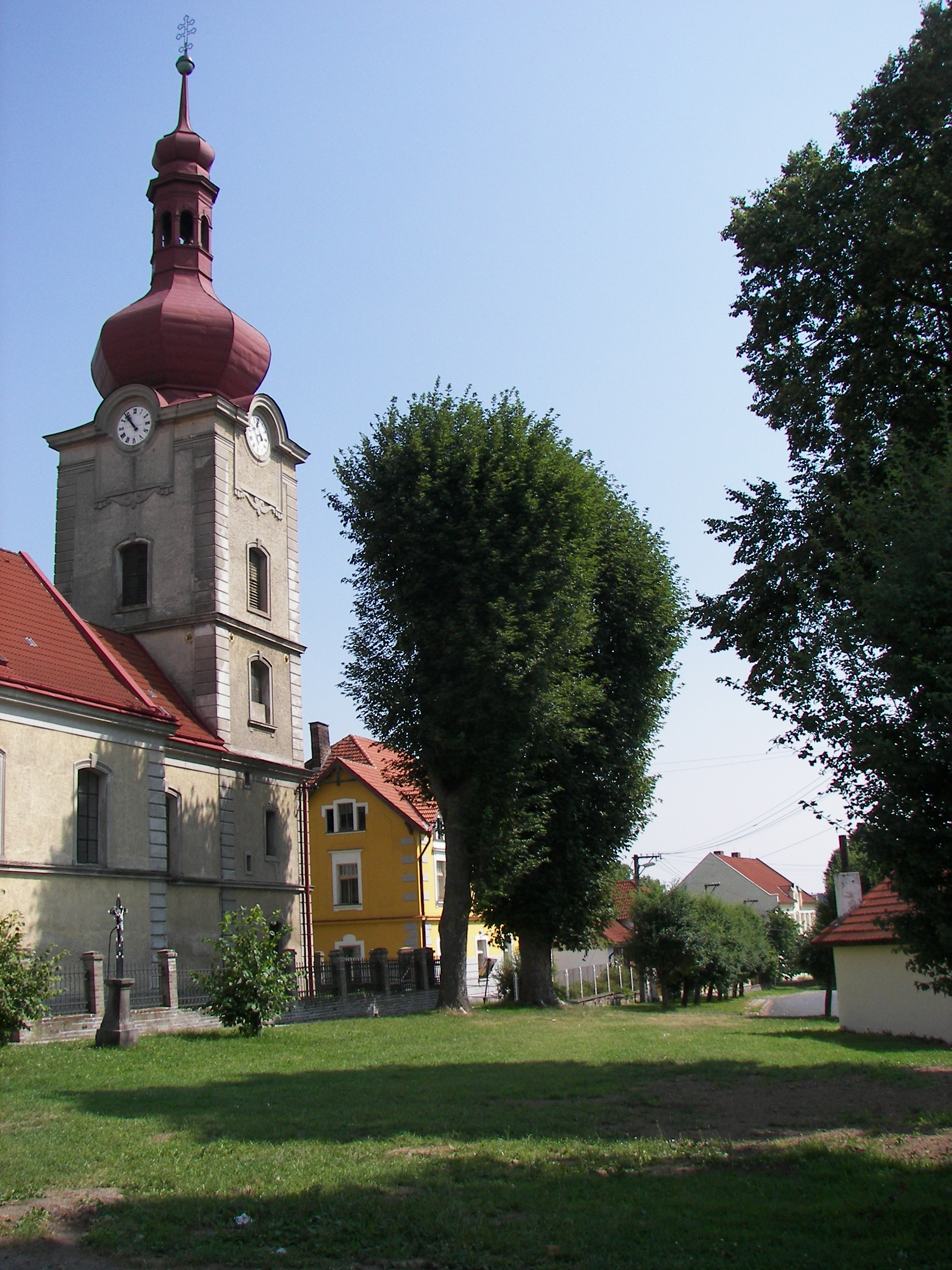 Smilovy hory - kostel a kousek návsi